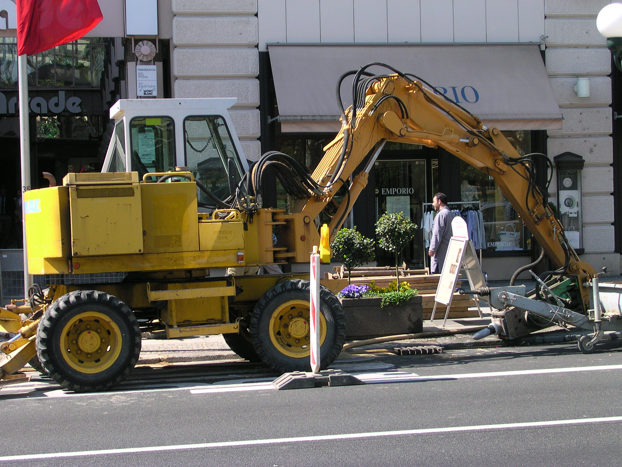 Benmac Radbagger, vielleicht 3.12